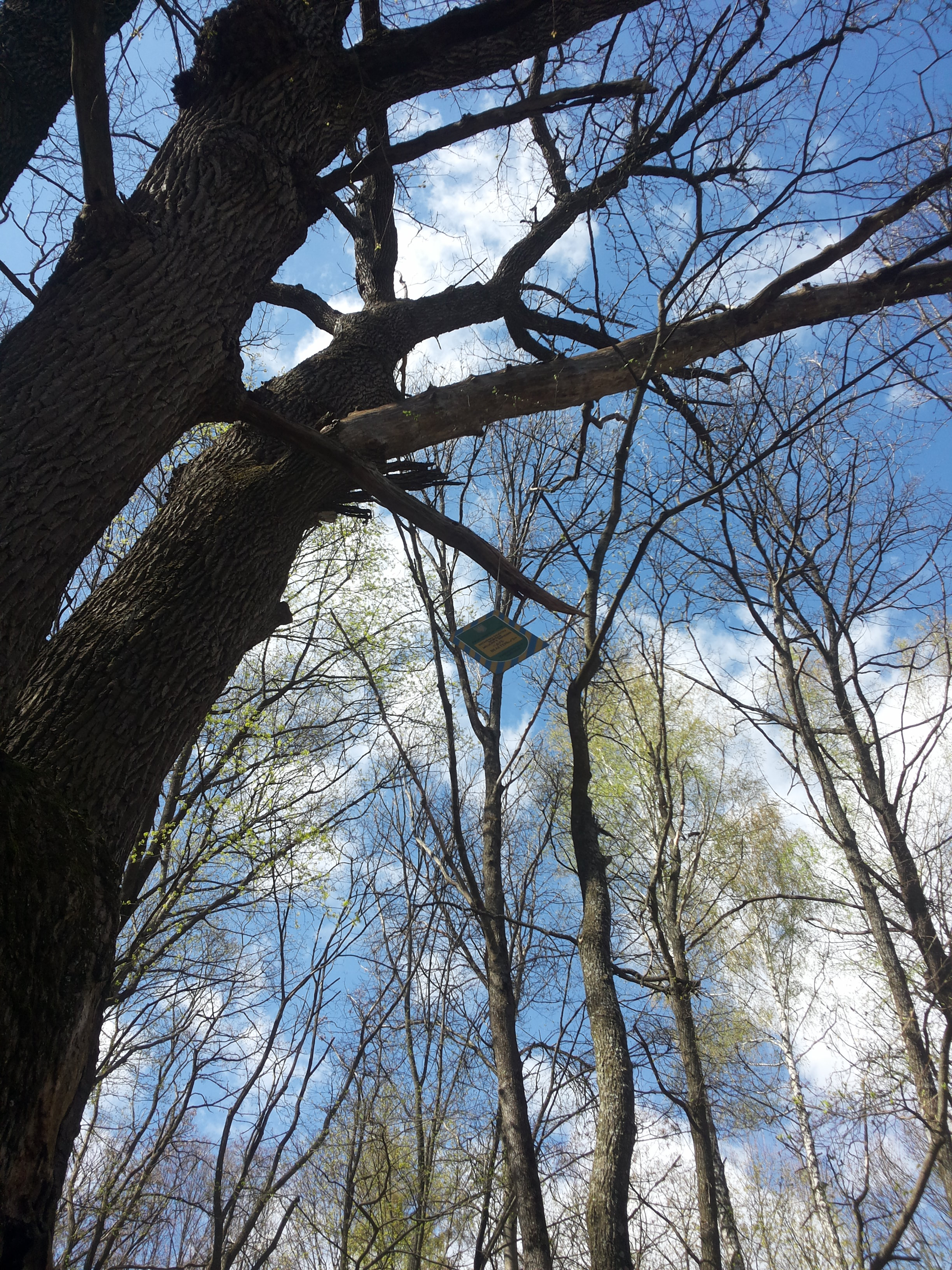 „Дуб-велетень № 3“, Валківський район Мерчицьке лісництво, кв. 73: вид. 1